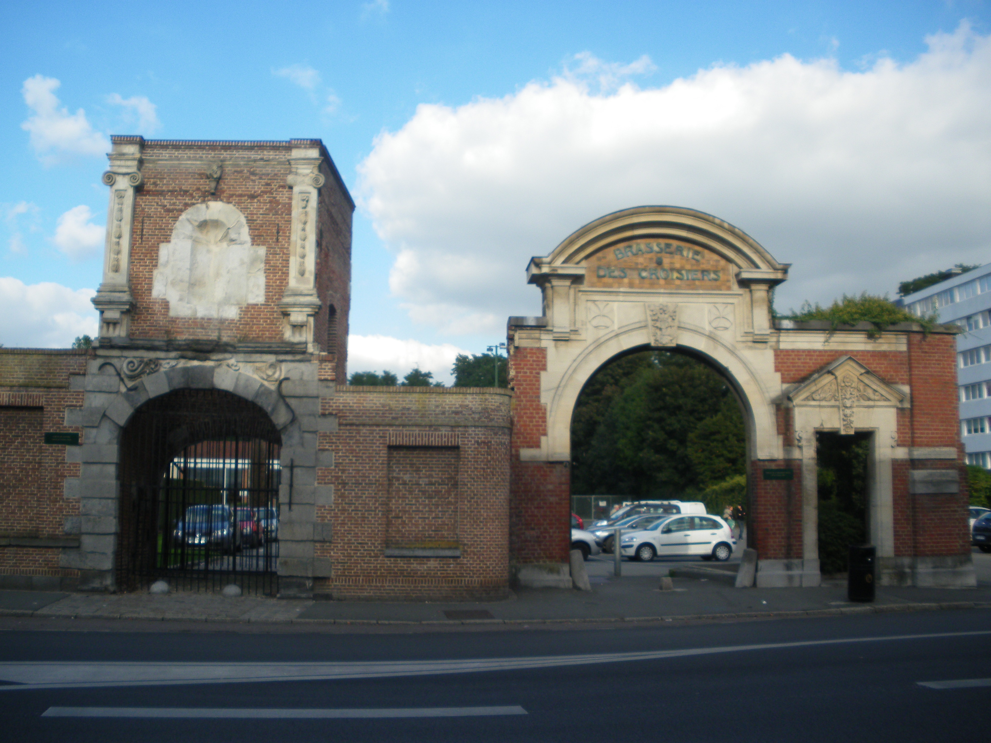 Vue de l'entrée de l'ancien couvent des Croisiers et de la porte de la brasserie-malterie Mulle Gadenne de Lannoy dans le Nord.